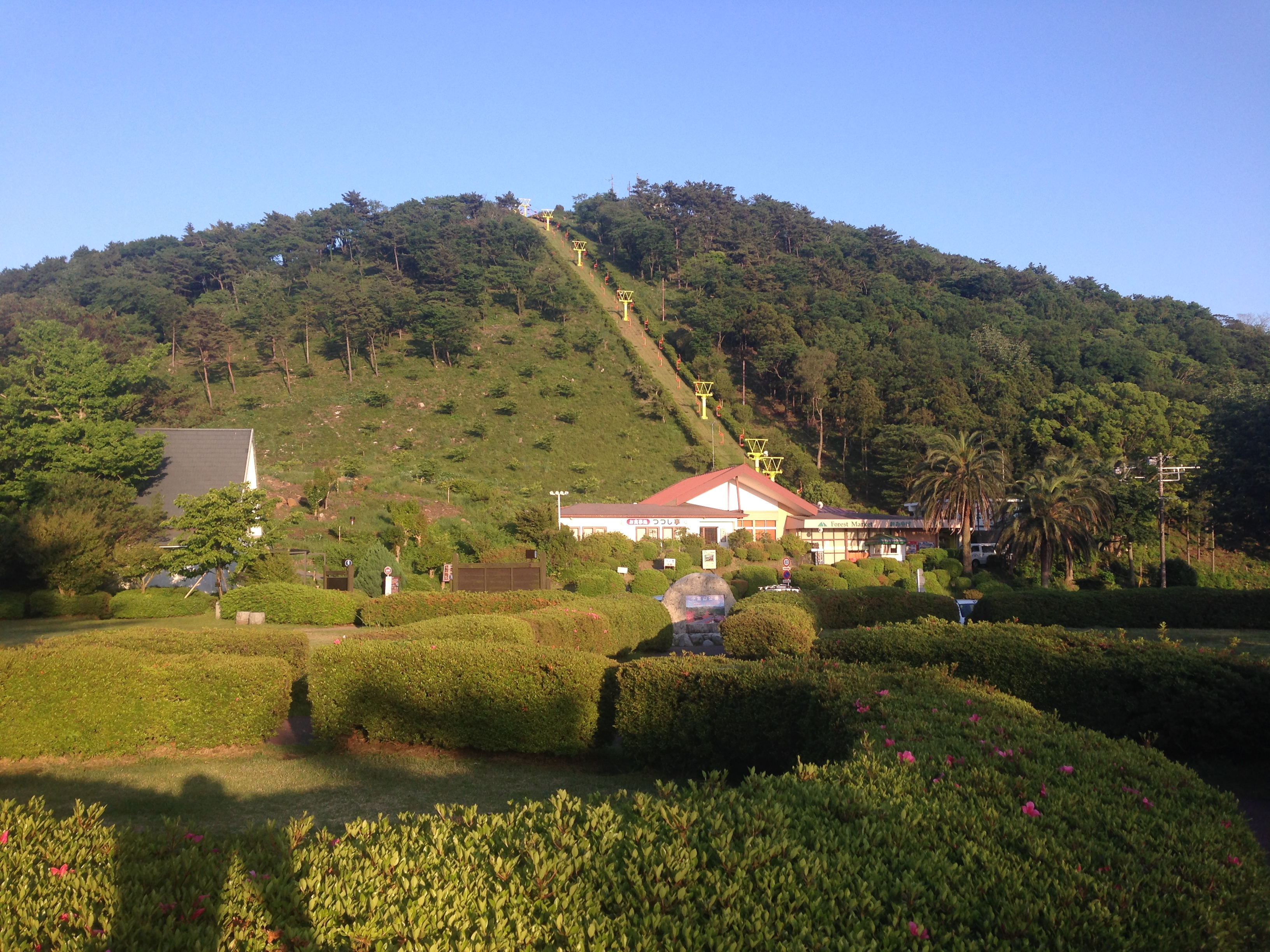 小室山と小室山公園。